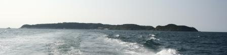 新宮沖に浮かぶ相島